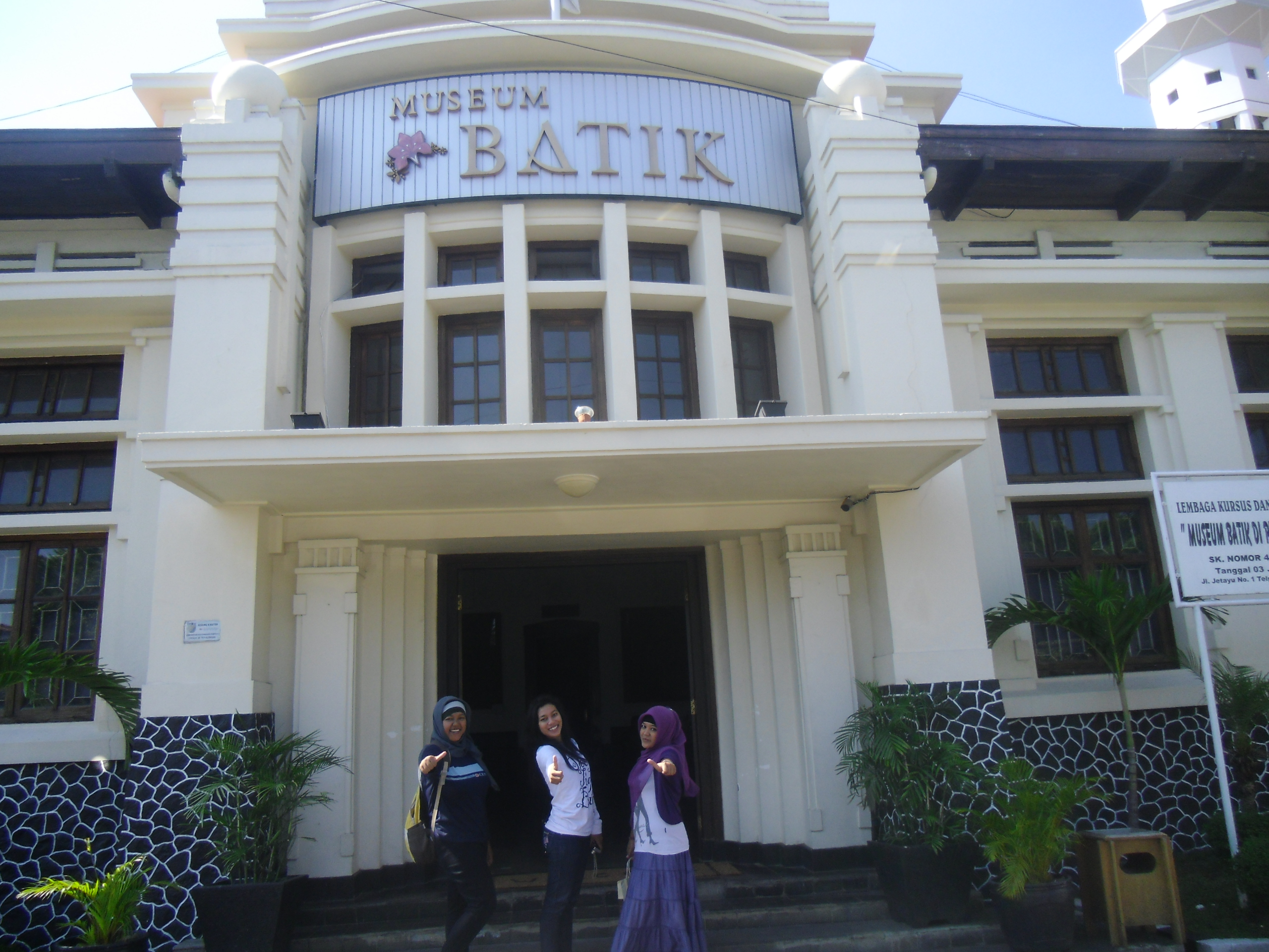 Jawa: Museum Batik Pekalongan (Novia_UNDIP)